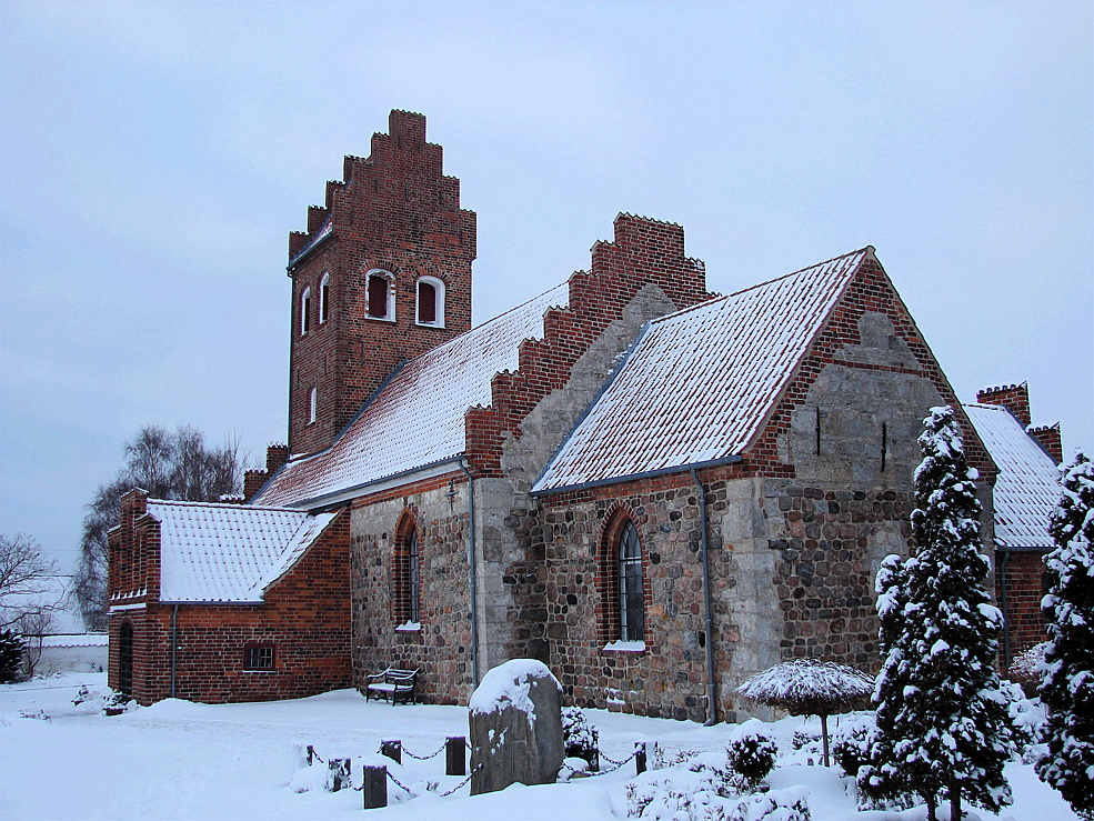 Draaby Kirke, Over Dråby, Sjælland.